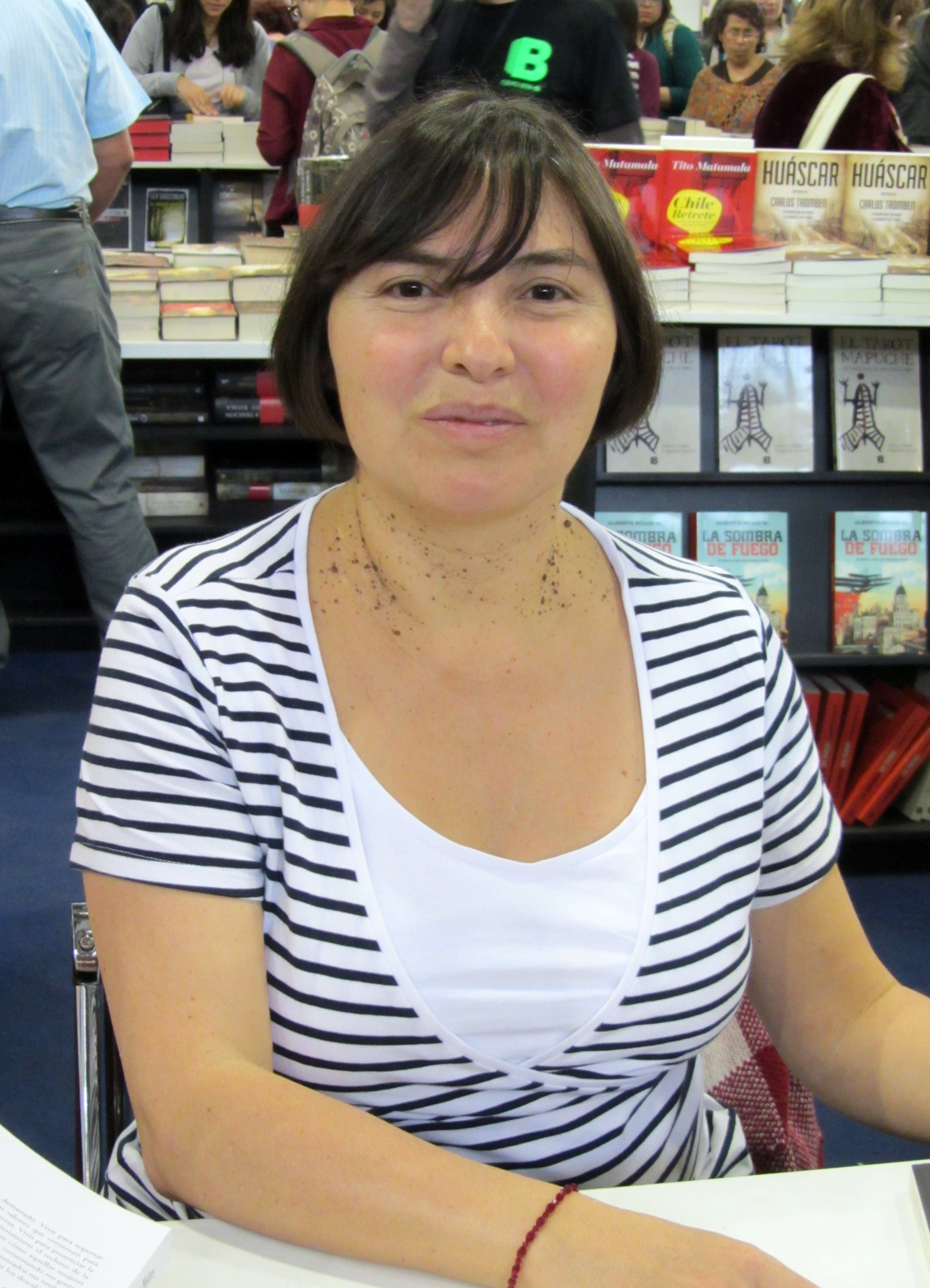 La escritora y periodista chilena Alejandra Matus en la Feria Internacional del Libro de Santiago 2015